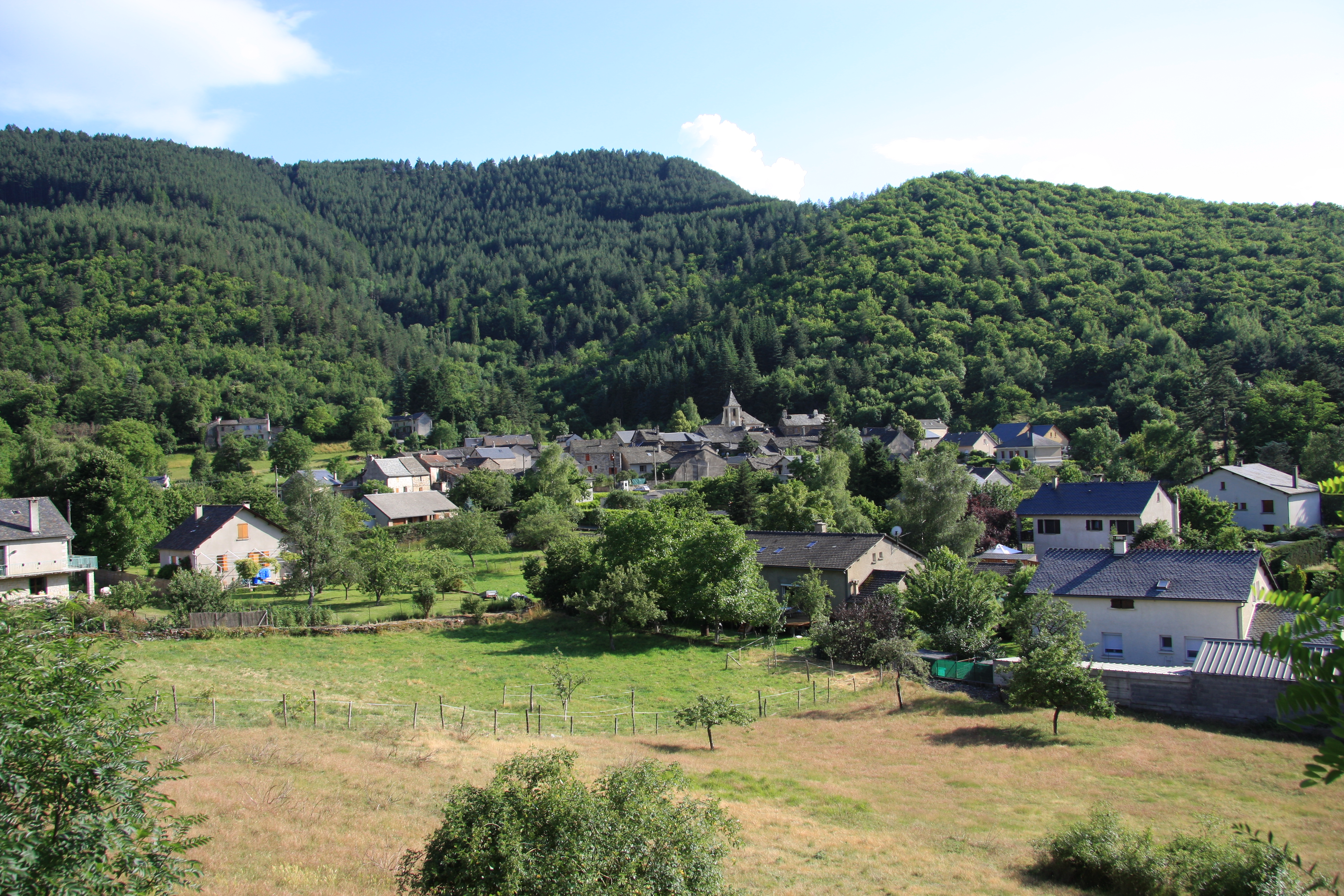 Bédouès en Lozère (France) vu depuis le promontoire de la collégiale